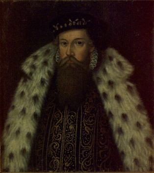 Konung Erik XIV av Sverige, 1533-1577